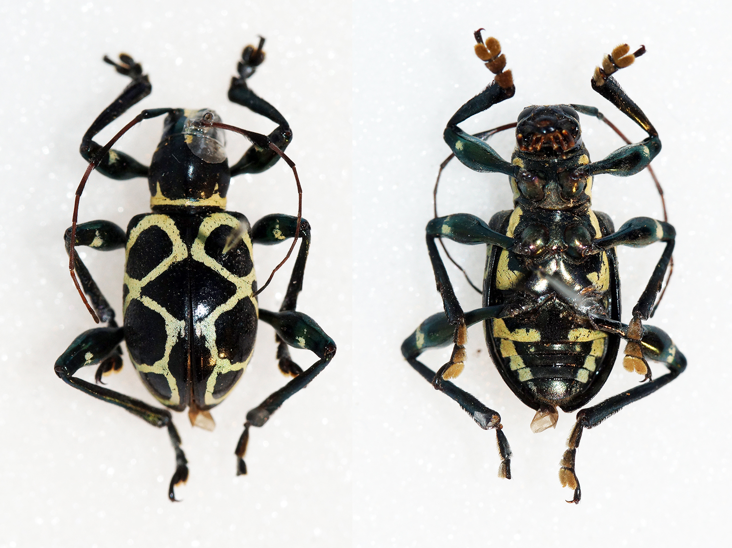 Heller,1916 Sex: ? Data: 05-2015 - Sierra Madre - Dingalan Aurora - Eastern Luzon - Philippines Size: 13mm